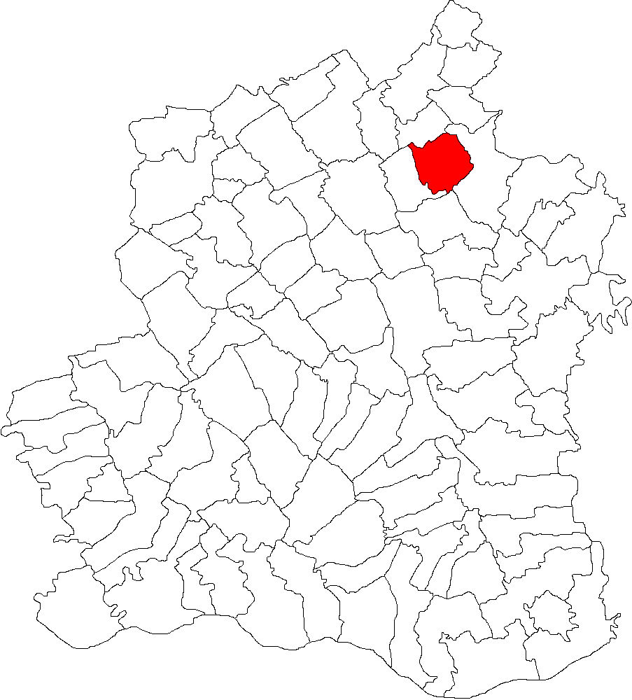 Categorie:Hărţi ale judeţului Teleorman